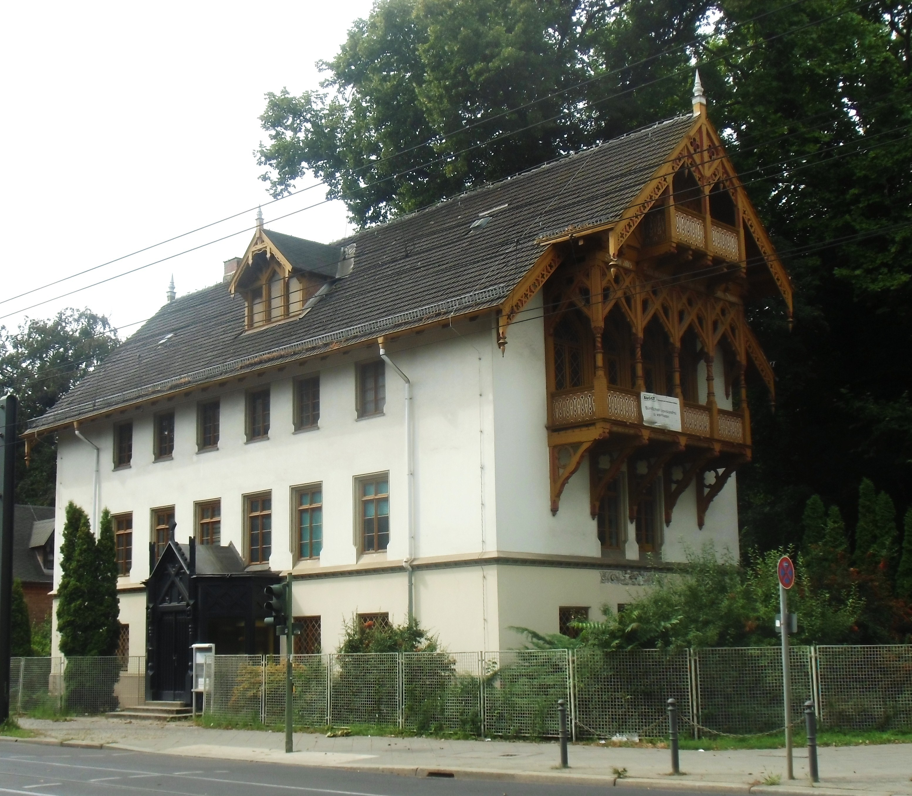 Denkmalgeschütztes Wohnhaus, auch "Holländerhaus" genannt, erbaut 1847